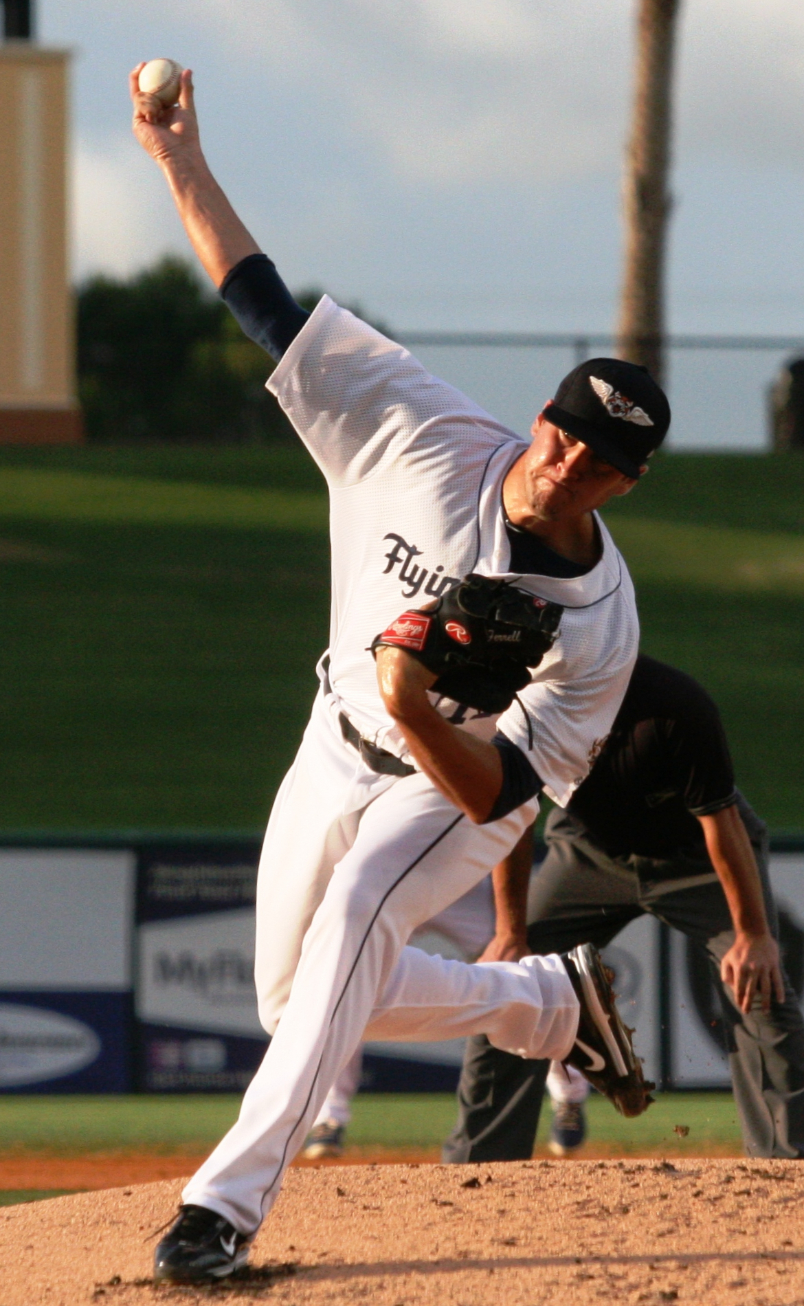 Jeff Ferrell